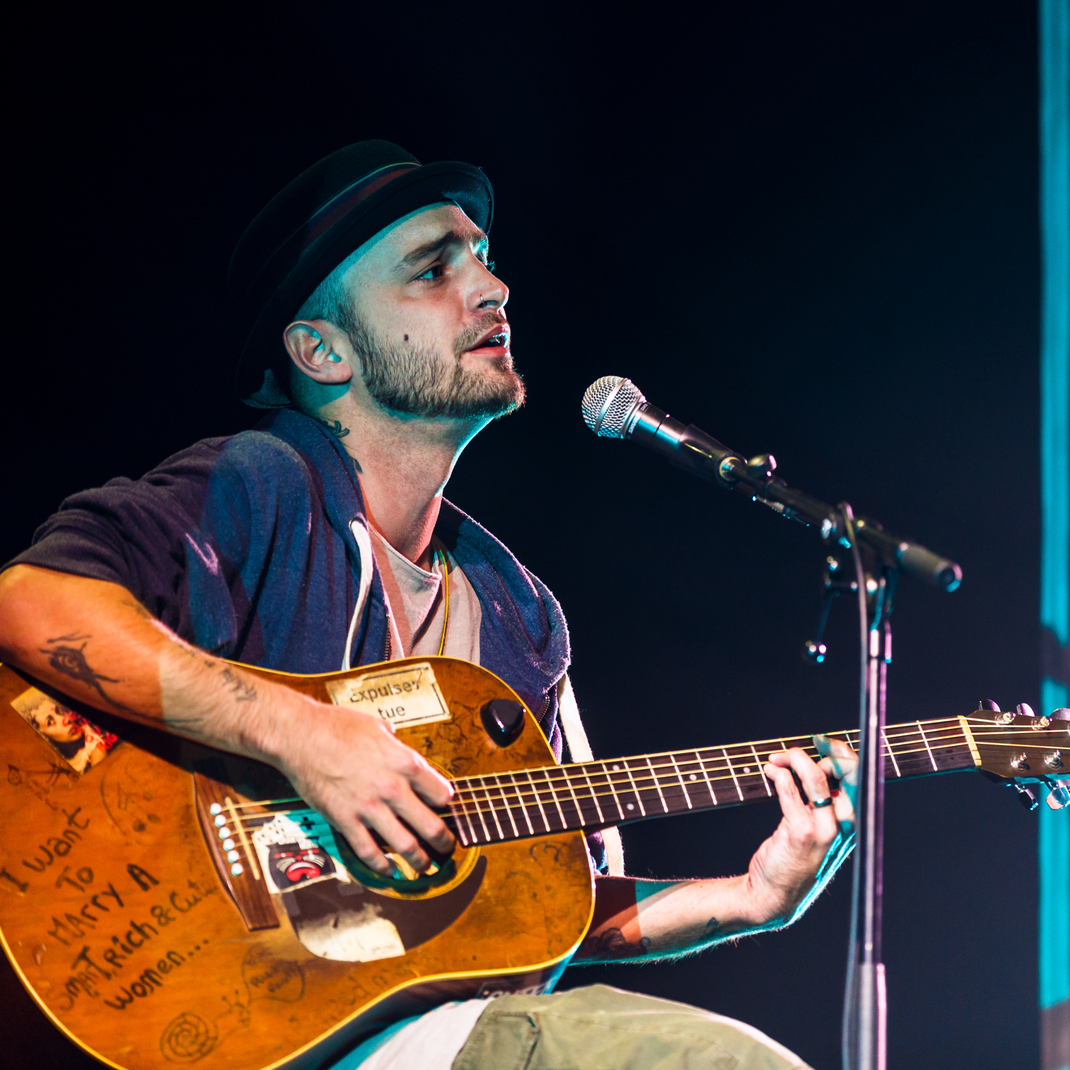 Soan en ouverture du concert de Zaz à Brest Arena, organisé par Diogène Production le 5 novembre 2016.